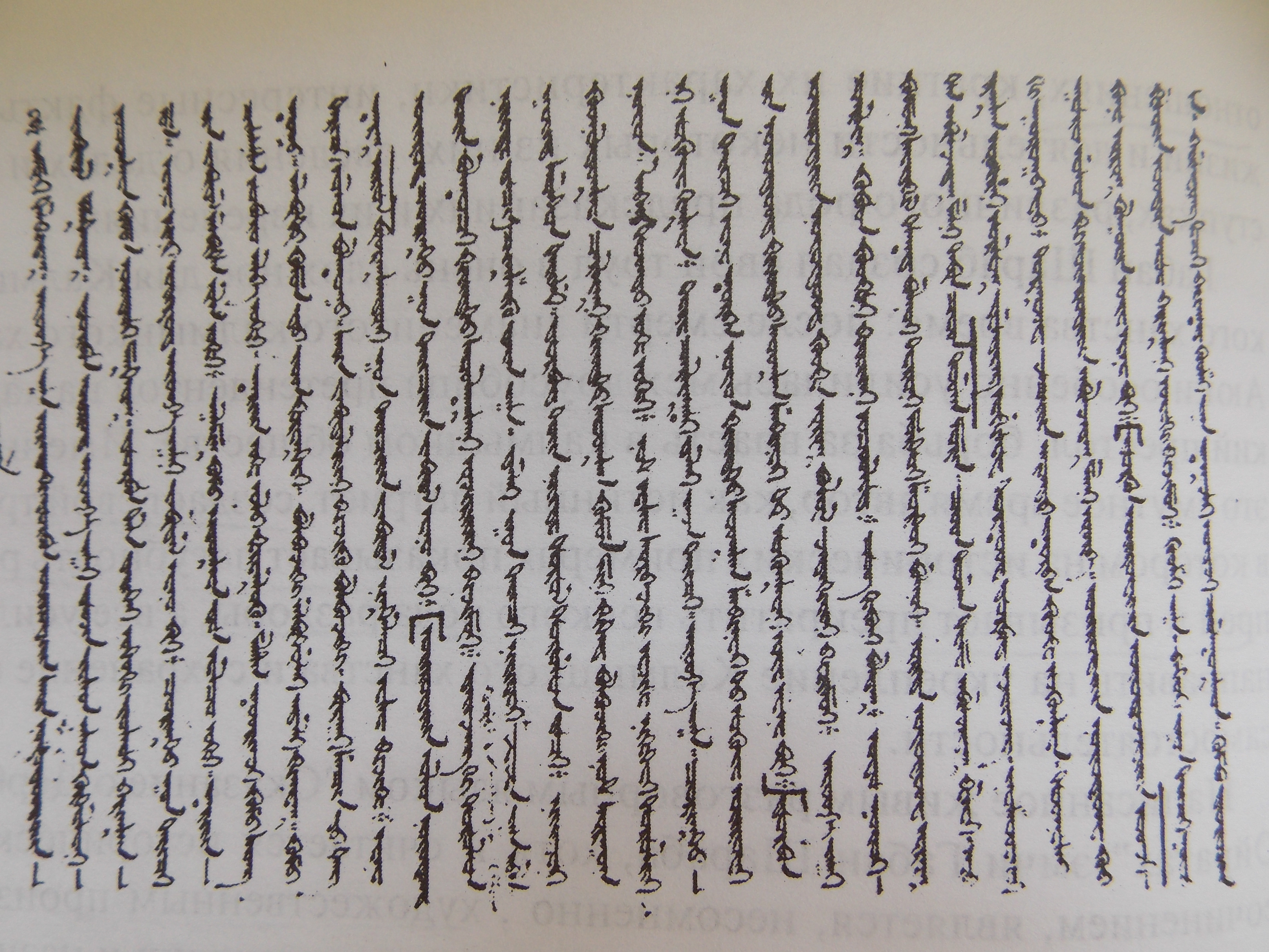 Рукопись "Сказание о дербен-ойратах" Габан Шараба. Лист 6 (а), СПбФ ИВ РАН